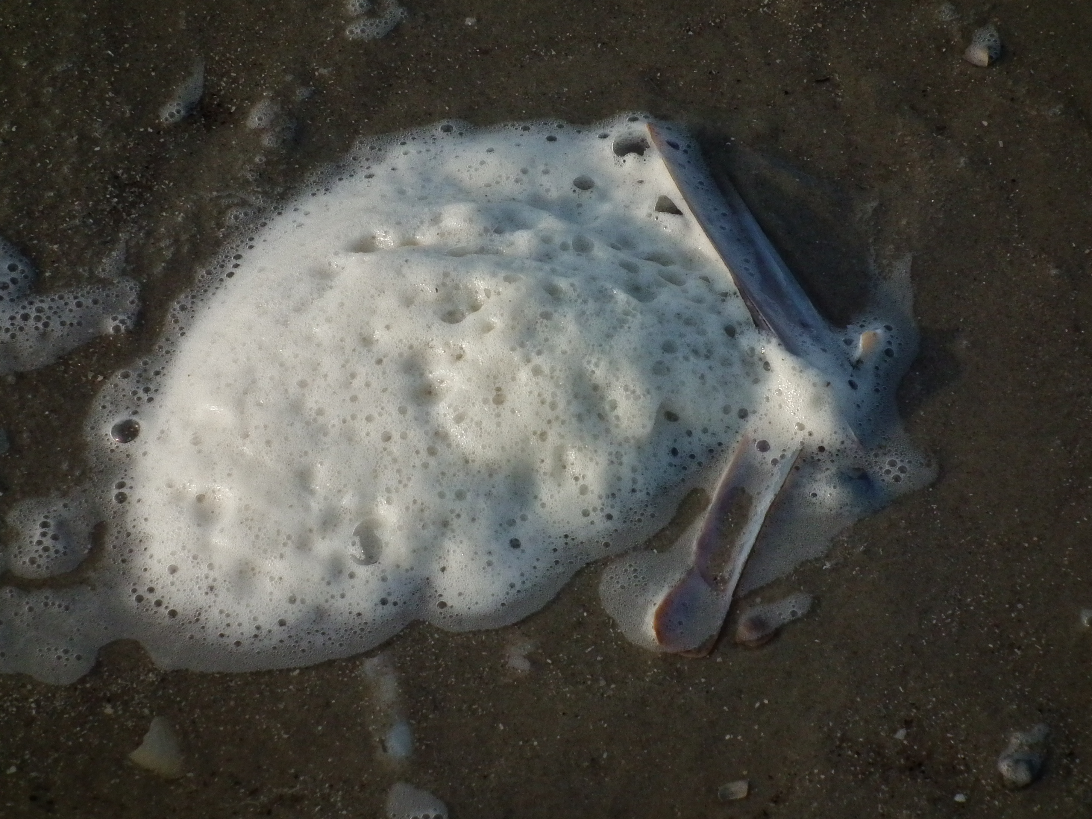 Abgestorbene Schaumalgen (Phaeocystis globosa) im Spülsaum der ostfriesischen Nordseeinsel Juist (Niedersachsen, Deutschland)